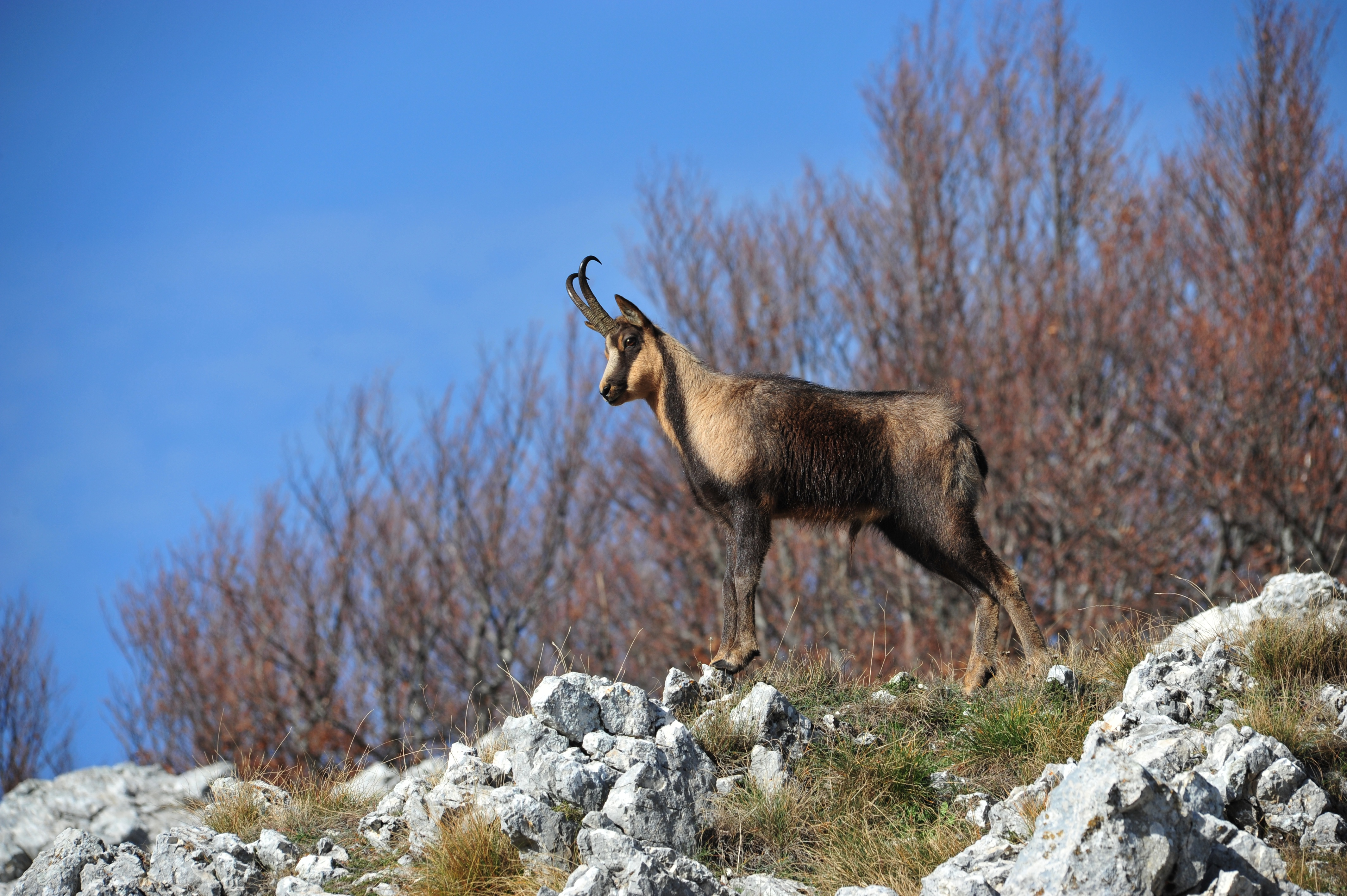 Località Monte Amaro nei pressi di Opi. This is a photo of a monument which is part of cultural heritage of Italy.